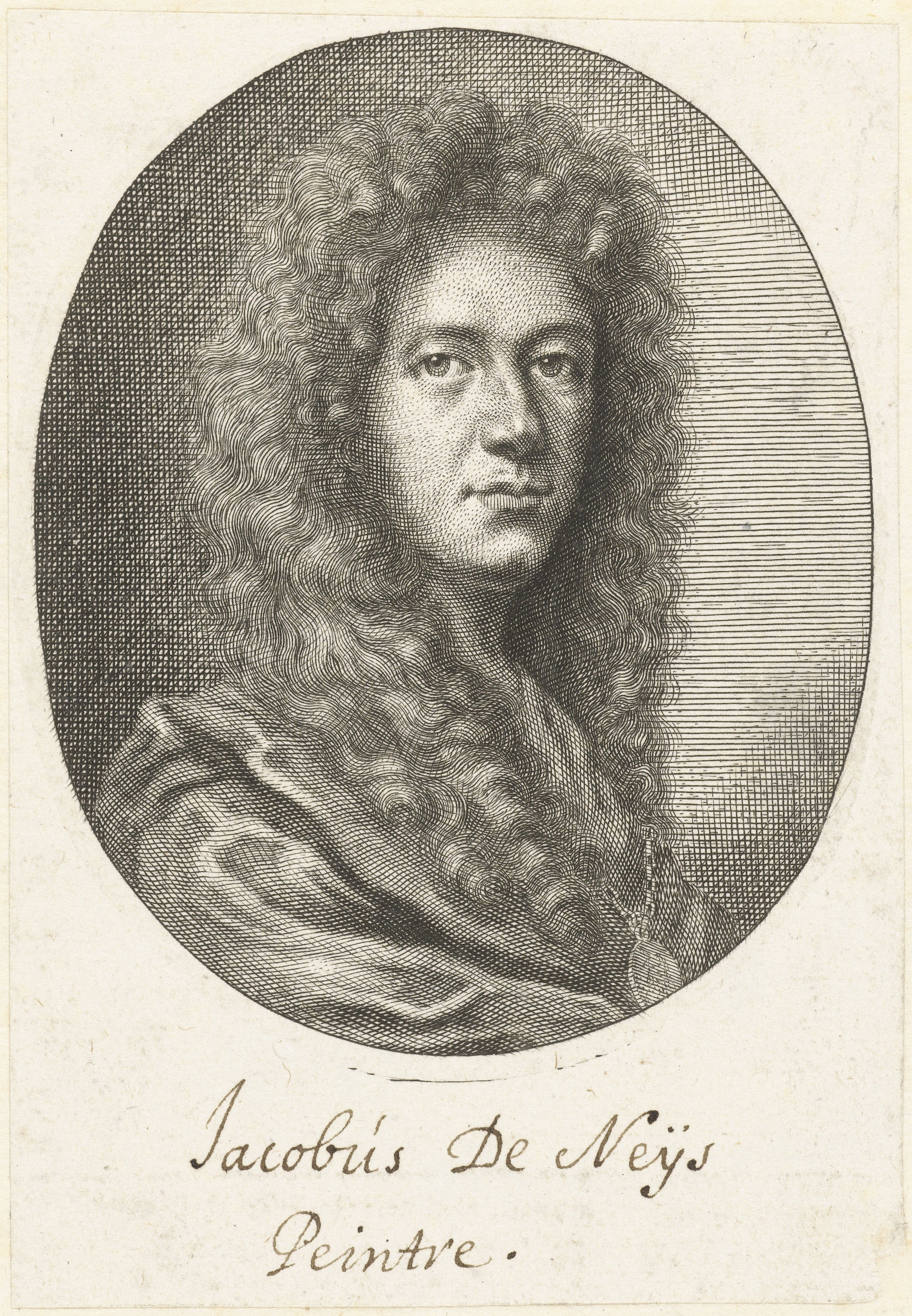 IdentificatieTitel(s): Portret van de schilder Jacob DenysObjecttype: prent Objectnummer: RP-P-1940-640Catalogusreferentie: Hollstein Dutch 7Opschriften / Merken: opschrift, recto, handschrift: ‘Jacobus De Neijs Peintre.’verzamelaarsmerk, verso, gestempeld: Lugt 2228verzamelaarsmerk, verso, gestempeld: Lugt 2760VervaardigingVervaardiger: prentmaker: Richard CollinPlaats vervaardiging: Zuidelijke NederlandenDatering: 1650 - 1694Fysieke kenmerken: gravureMateriaal: papier Techniek: graveren (drukprocedé)Afmetingen: plaatrand: h 94 mm (ovaal) × b 80 mm (ovaal)ToelichtingBehoort tot de Verzameling Gerritsen, kunstenaarsportrettenOnderwerpWie: Jacob Denijs (1644-1708)Verwerving en rechtenCredit line: Aankoop uit het F.G. Waller-FondsVerwerving: aankoop 1940Copyright: Publiek domein